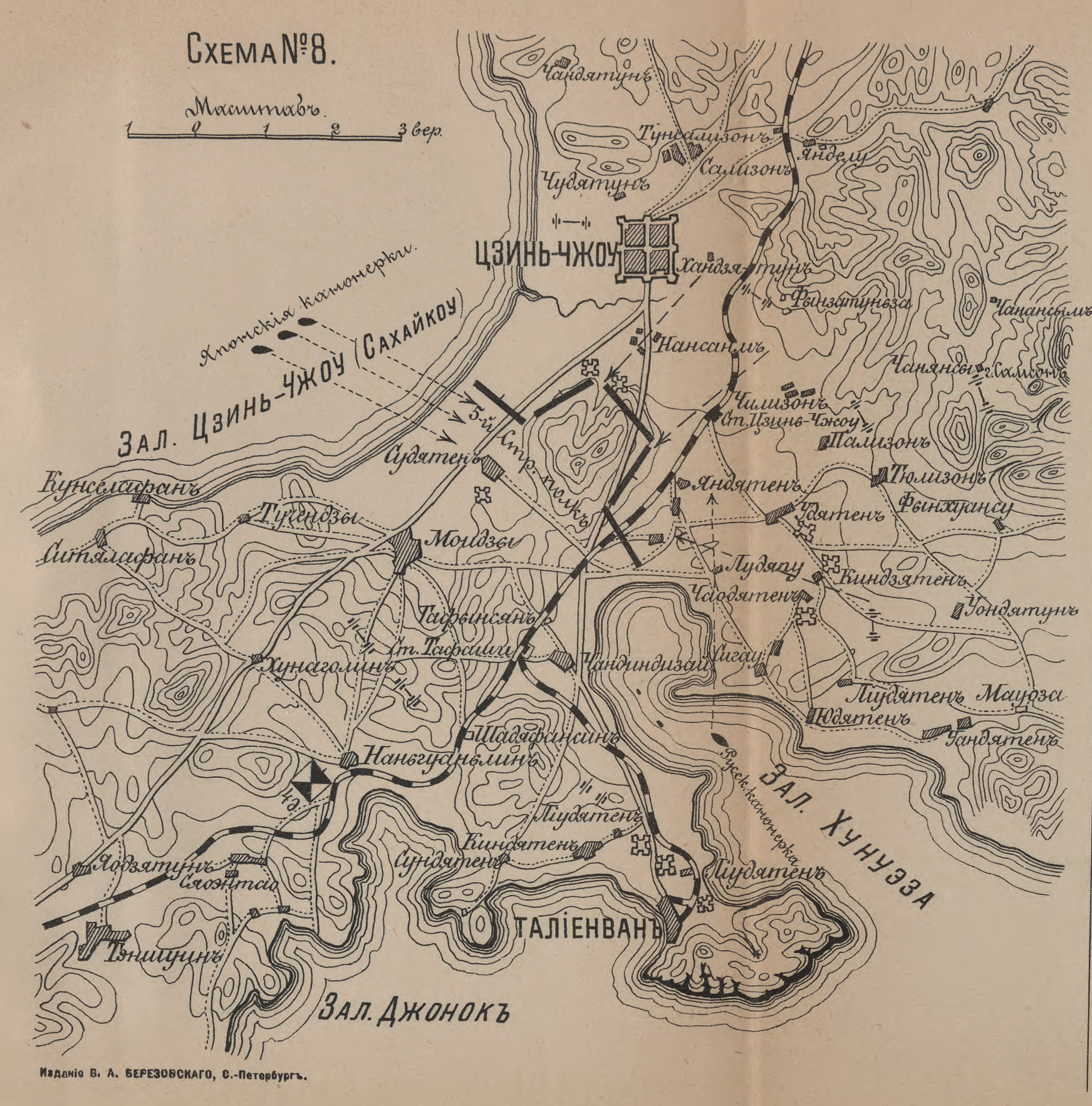 Battle of Nanshan map Карта боя у Цзиньчжоу (Кинчжоу)